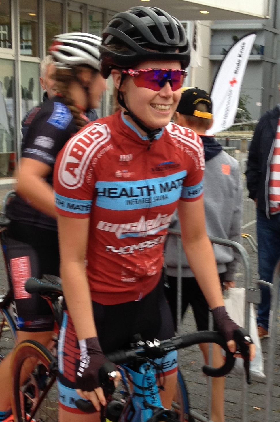 Criterium RaboRonde in Heerlen op vrijdag 2 augustus 2019